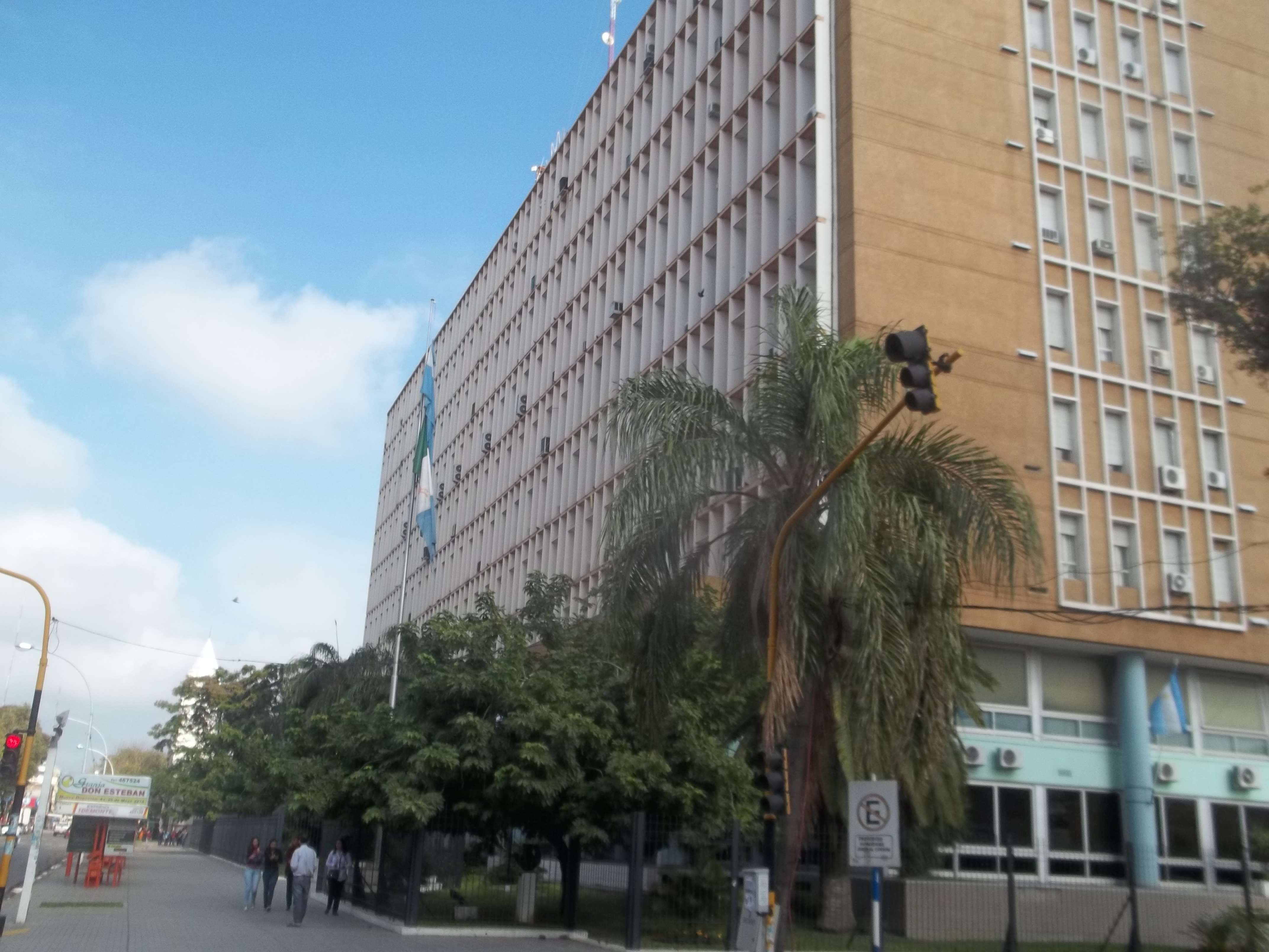 Vista de la Casa de Gobierno de la Provincia del Chaco desde la esquina Norte de las calles Marcelo T. de Alvear y Mitre, hacia la calle Mitre descendente. Se puede apreciar al fondo la cúpula de la Catedral.